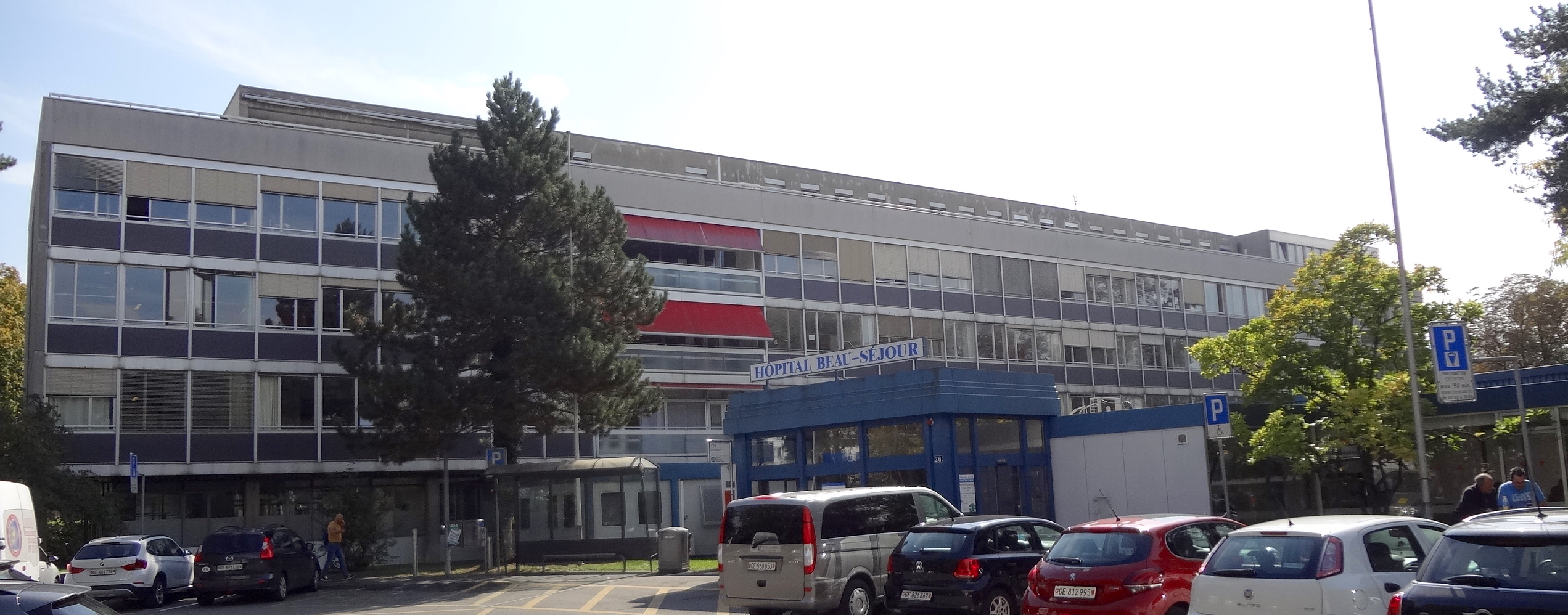 Hôpital Beau-Séjour à Genève, traitements de réhabilitation et thérapies de neurorééducation, pluridisciplinaire. Entrée et bâtiment principal.